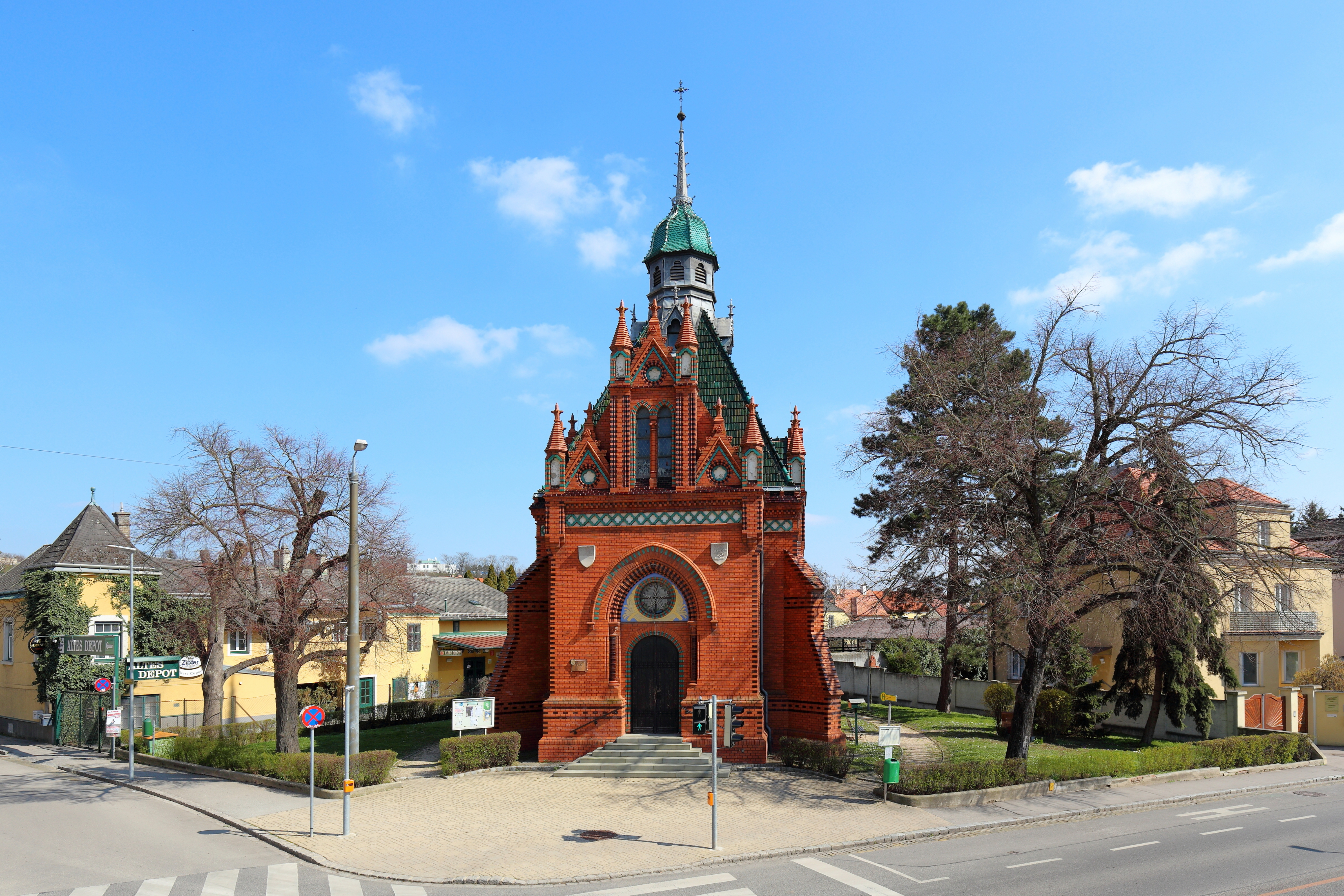 Südwestansicht der evangelischen Pfarrkirche in der niederösterreichischen Bezirkshauptstadt Mistelbach.Der hochgestreckte quaratischer Zentralbau in Formen der Backsteingotik mit bunt glasierten Ziegeln wurde von 1904 bis 1905 nach Plänen des Architekten Karl Weinbrenner erbaut.